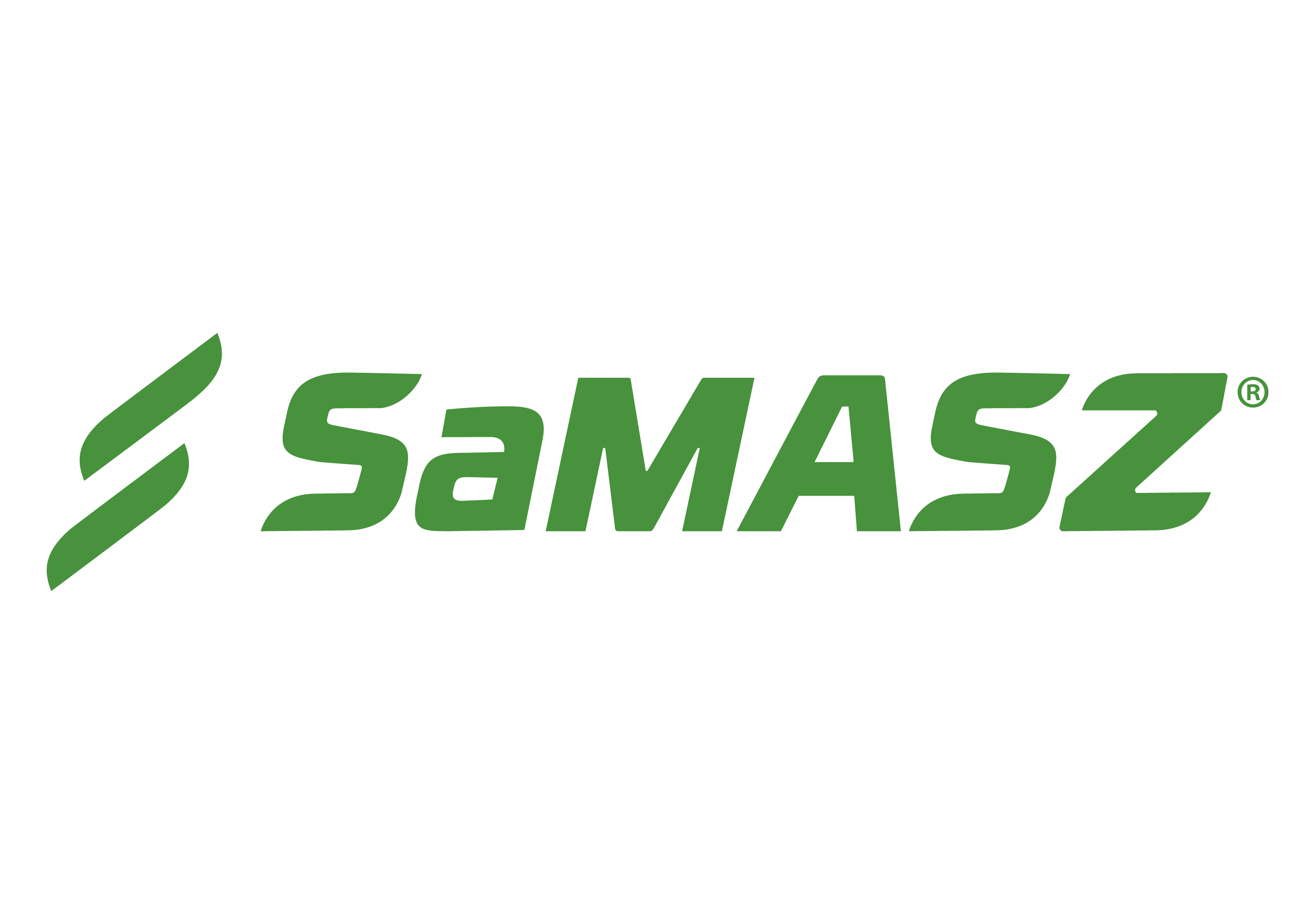 Logo SaMASZ